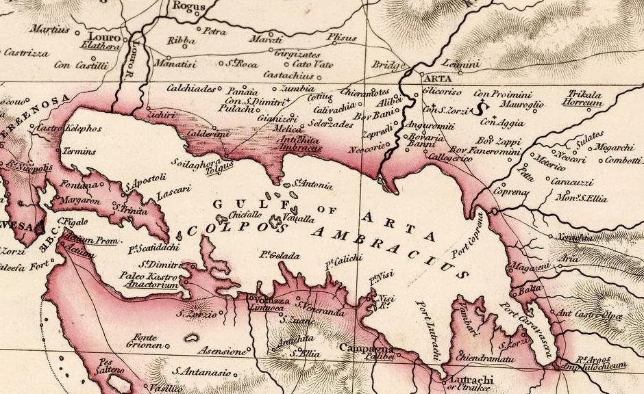 Αμβρακικός Κόλπος, 1819.